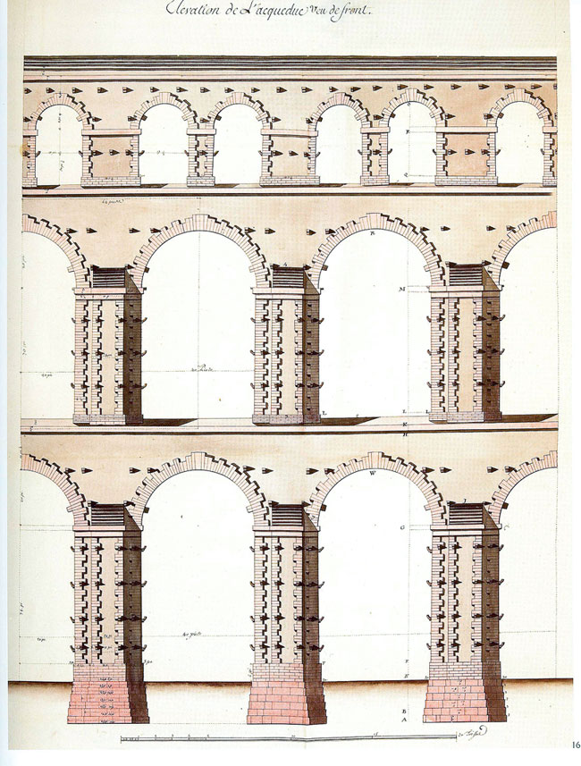 l'aqueduc de Maintenon tel qu'il devait être.